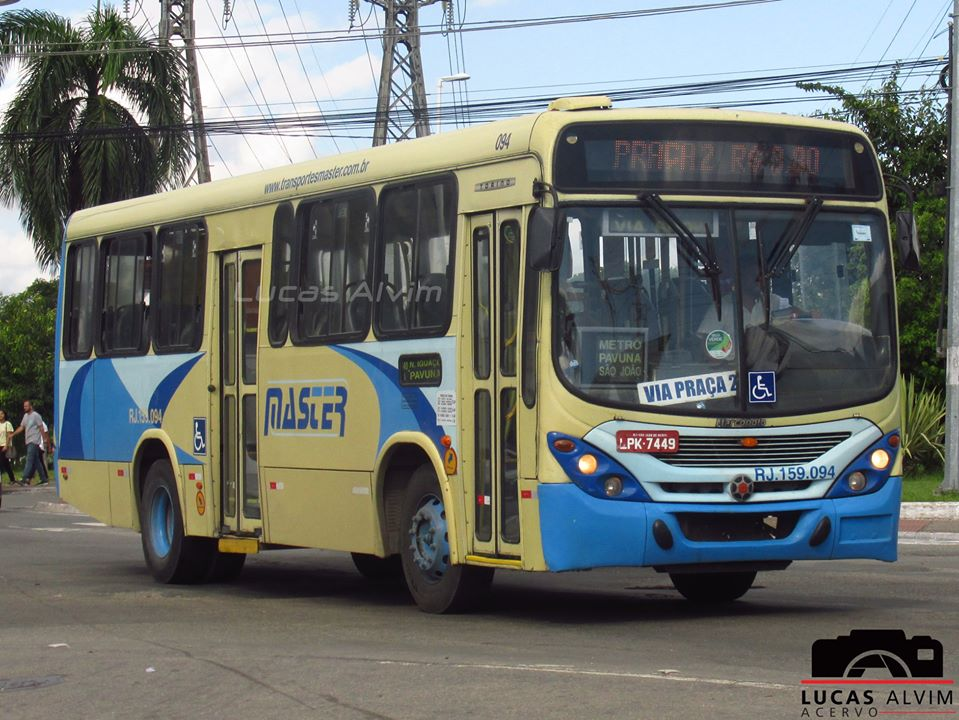 Ônibus da empresa